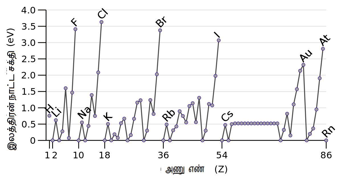 இலத்திரன் நாட்ட சக்தி வரைபு